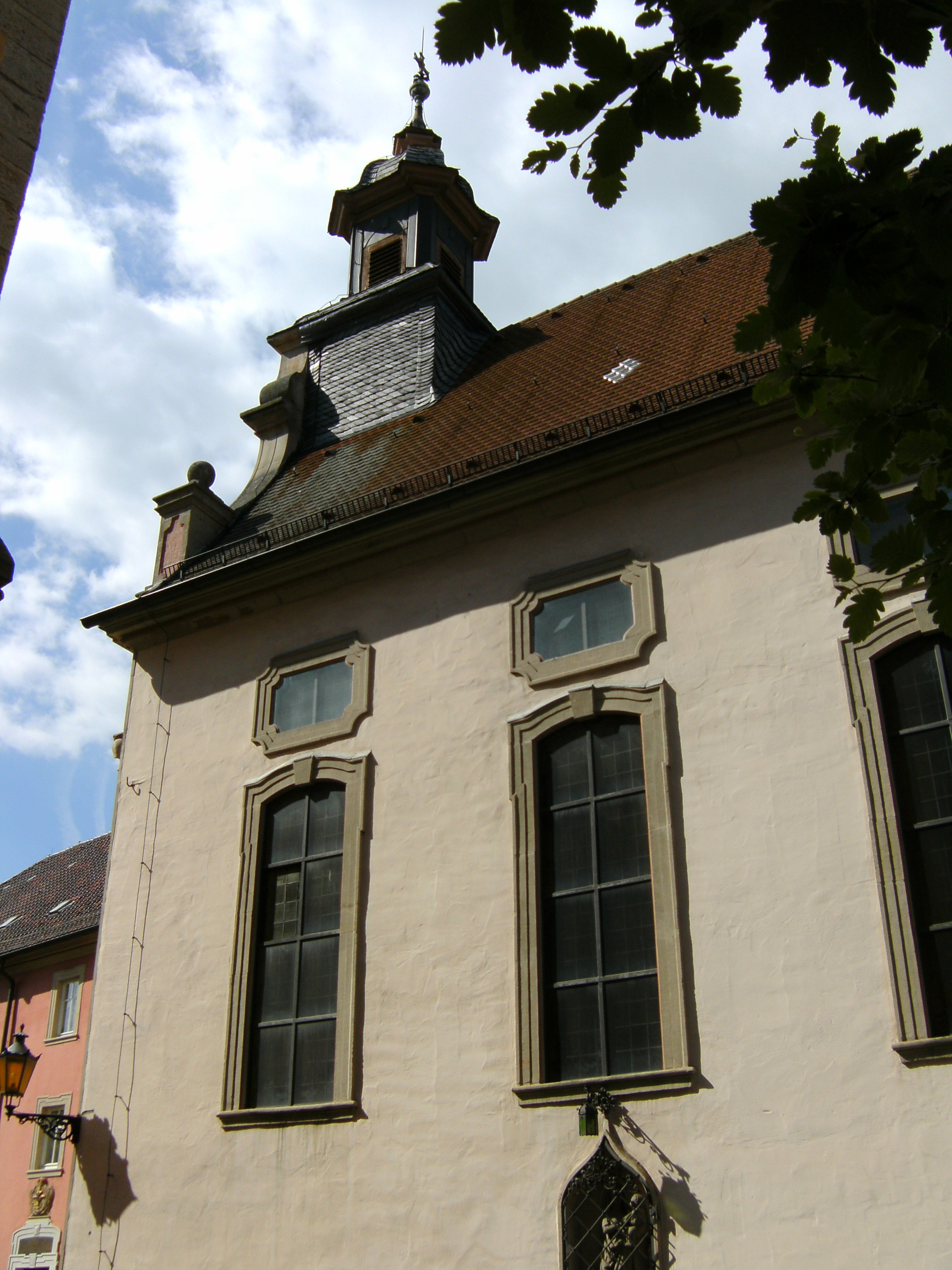 Bad Mergentheim, Spitalkapelle des Deutschen Ordens, erbaut von Franz Joseph Roth